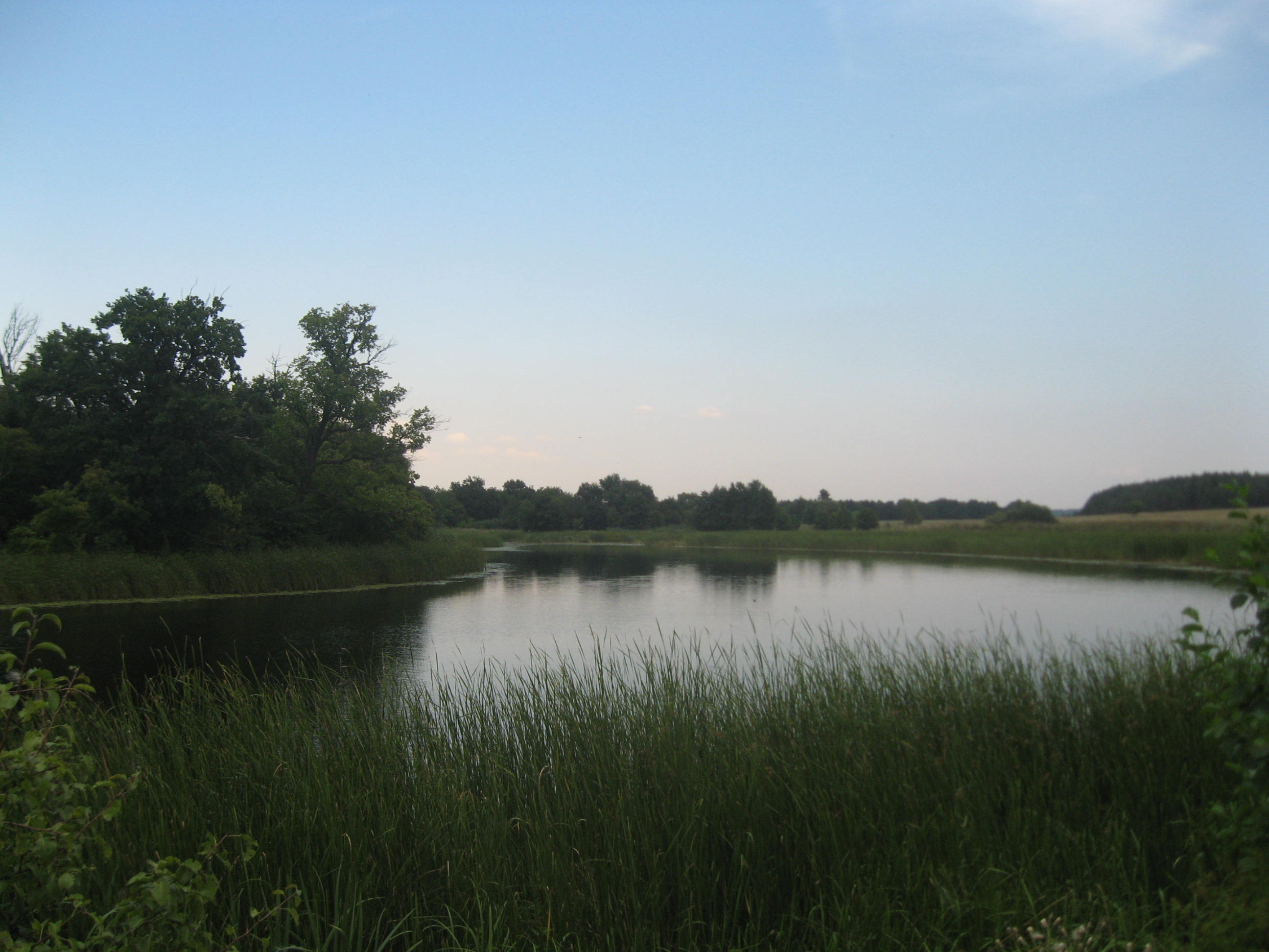 Битюг у села Новый Курлак.